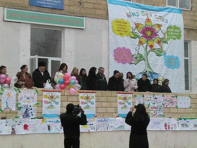 Дети и взрослые на празднике толерантности в сел. Сергокала (школа №1, февраль, 2007)